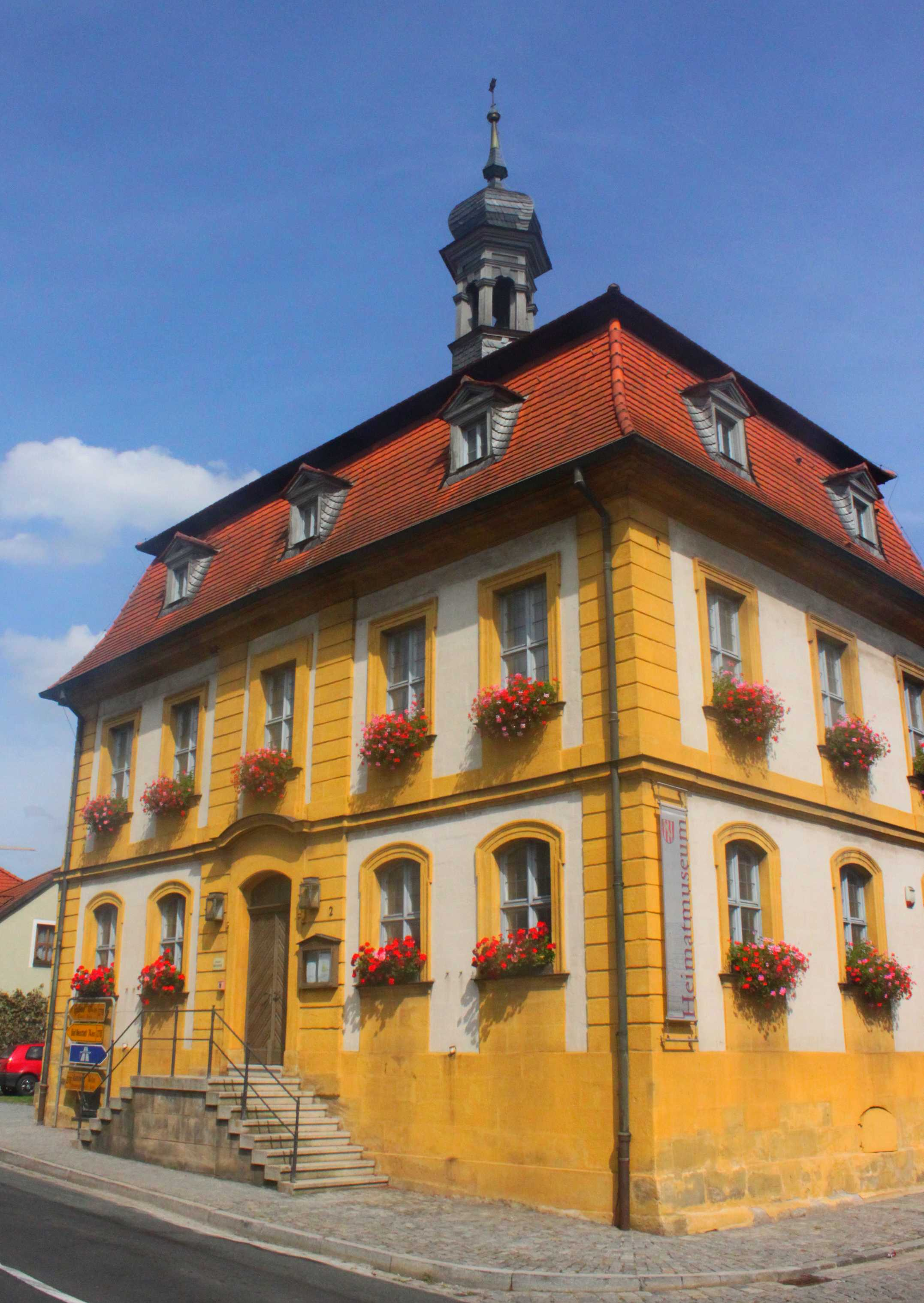 Das Alte Rathaus in Baunach mit dem Heimatmuseum